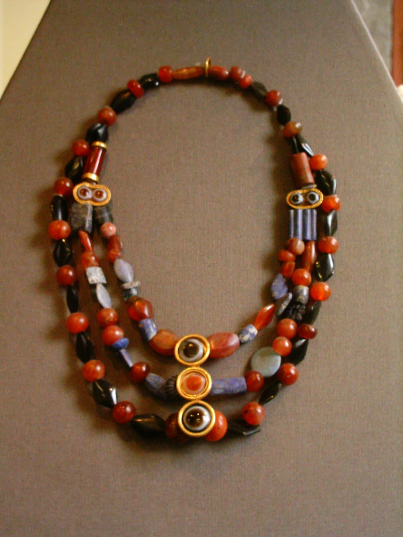 Halskette aus Karneol, Lapislazuli, Obsidian, Onix und Gold. Pergamon Museum, Berlin.